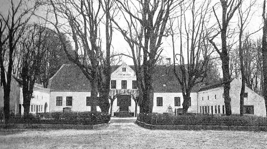 Nordskov nævnes første gang i 1495. Nordskov ligger i Gestelev Sogn, Sallinge Herred, Ringe Kommune. Hovedbygningen er opført i 1700